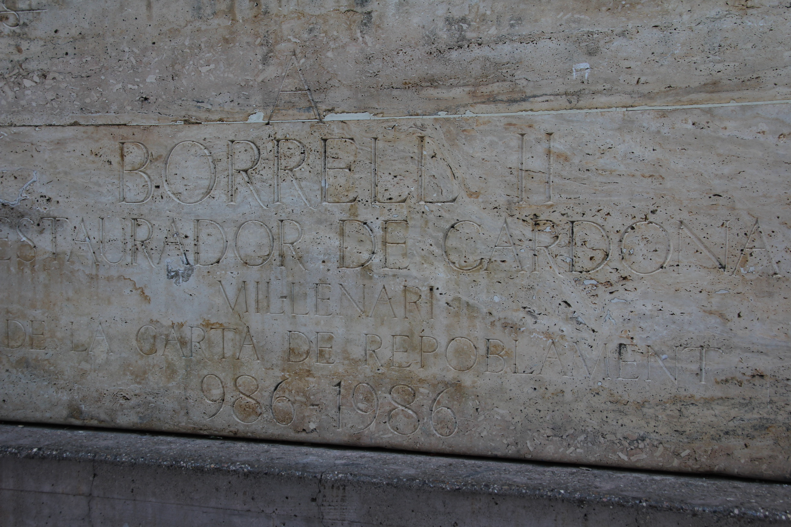 Nucli antic de Cardona